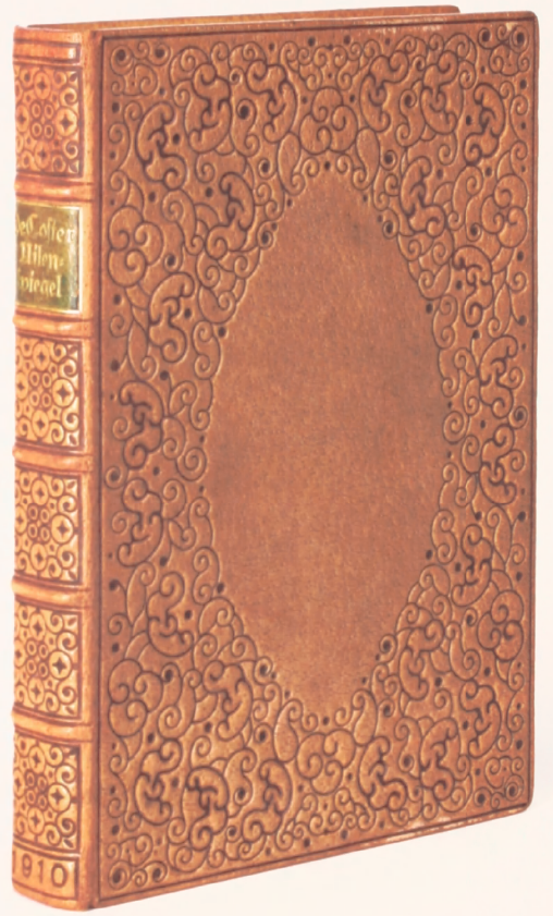 Privatbind udført 1911-12 af den danske bogbinder August Sandgren (1893-1934) − Helbind i gråligt svineskind (udførligere beskrivelse kan læses her, side 100) Bogen er Uilenspiegel und Lamme Goedzak ein fröhliches Buch trotzTod und Traenen Leipzig Heims 1910. Skrevet i 1867 af Charles De Coster (1827-1879) - Se The Legend of Thyl Ulenspiegel and Lamme Goedzak